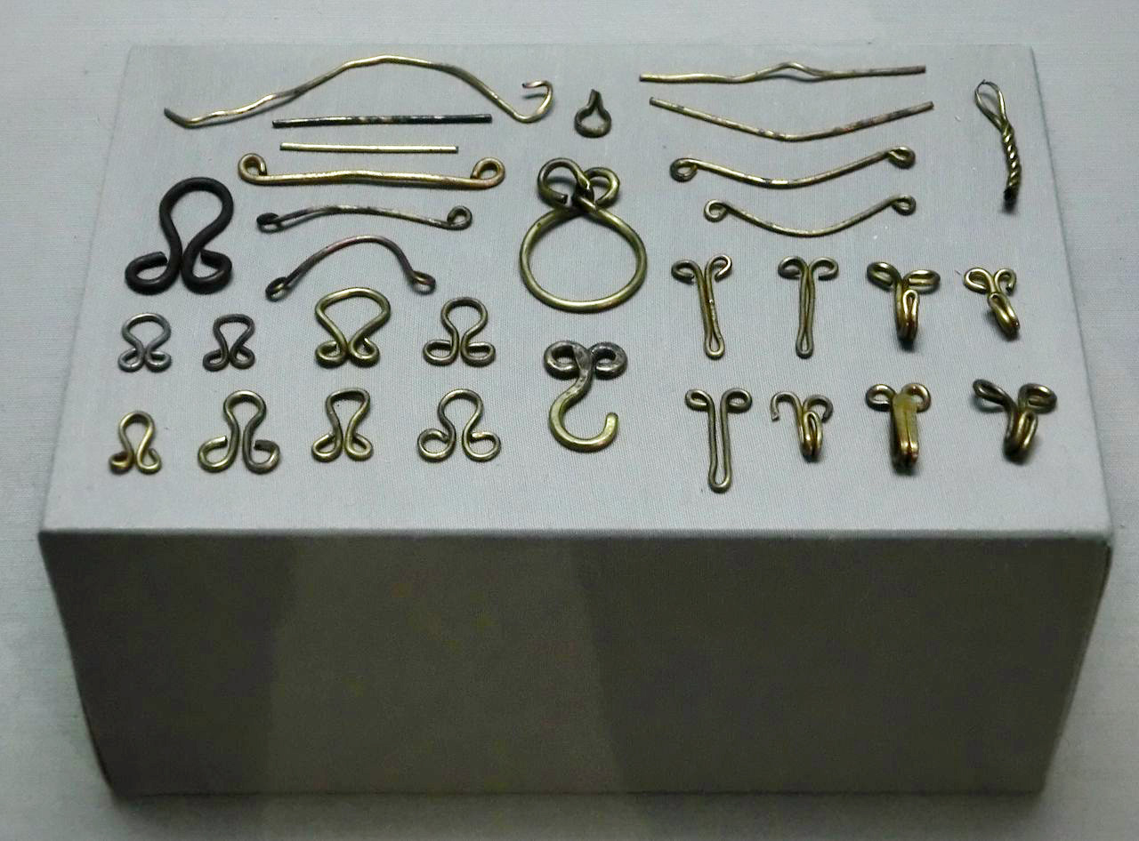 Deutschland - Bayern - Kempten: Ausstellung "Mühlberg-Ensemble im Allgäu-Museum. - "Haken und Ösen (15./16. Jh.); Ein Heftelmacher fertigte am St. Mang-Platz Häkchen und Ösen für Kleidung und Schuhwerk an, wie die vielen Rohlinge, Halbfabrikate und fertigen Stücke im Fundort zeigen."